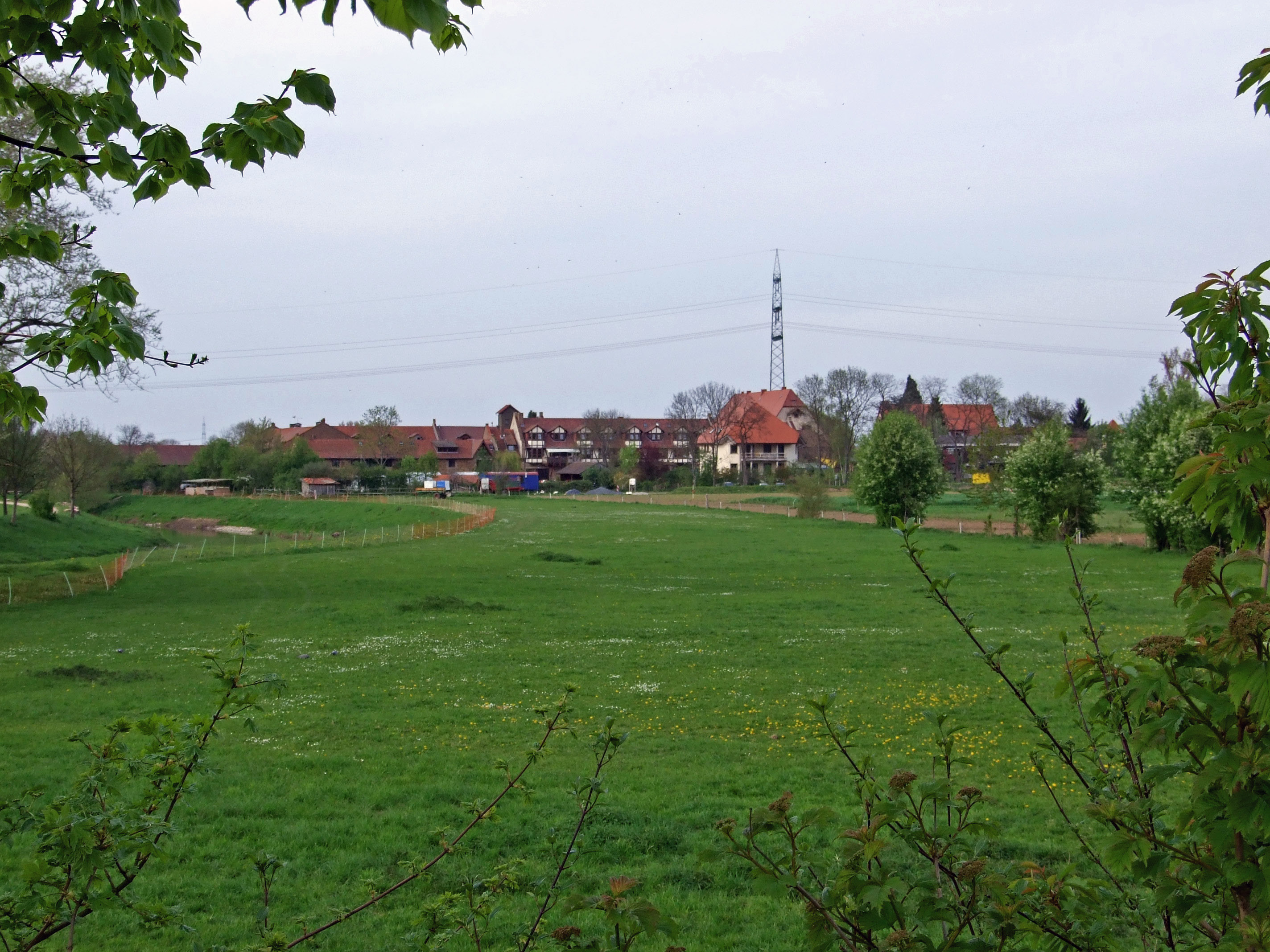 Nidda am "Dottenfelderhof", Bad Vilbel